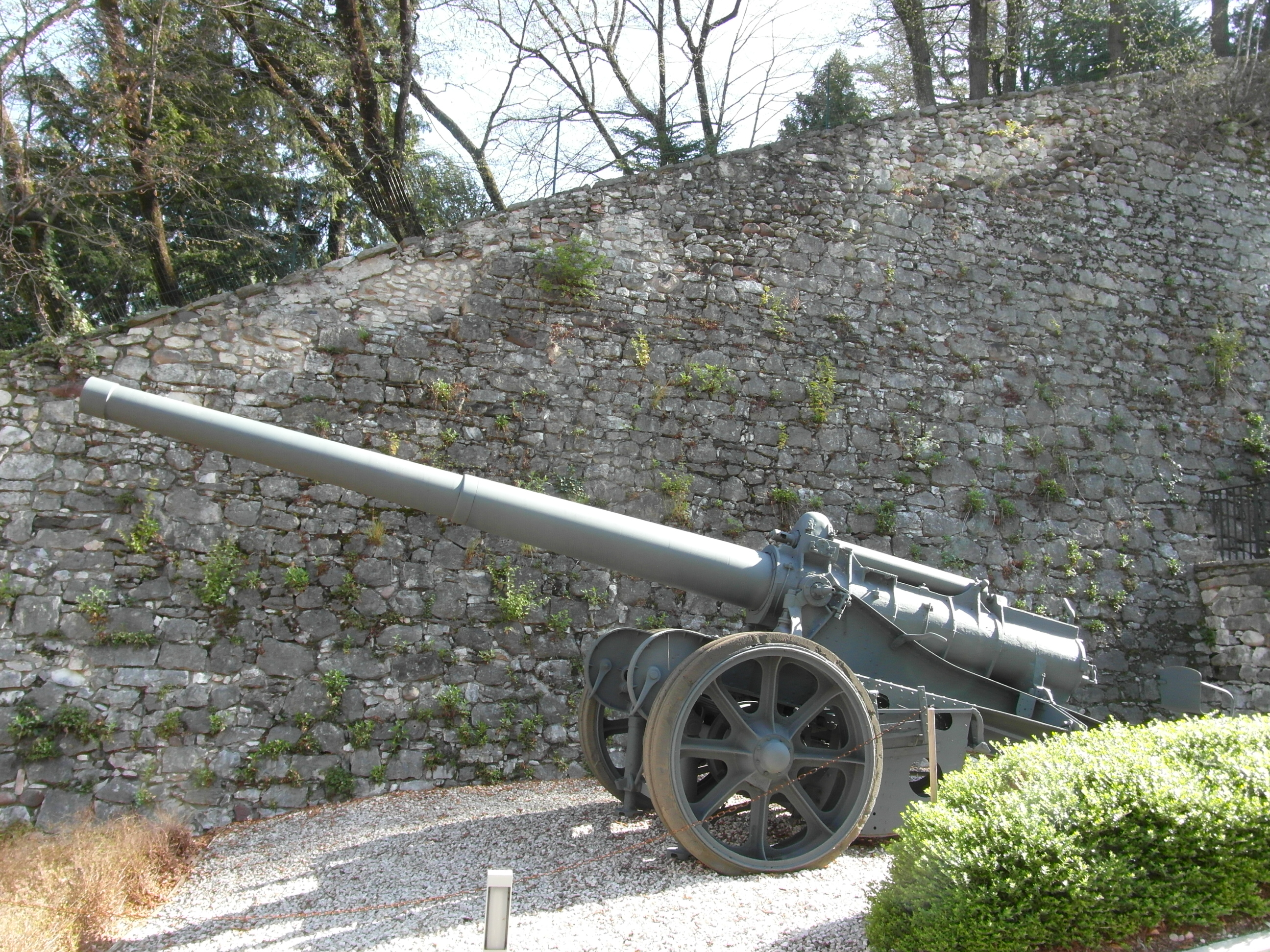 Cannone St Chamond 155 mle 1916 Rovereto 1